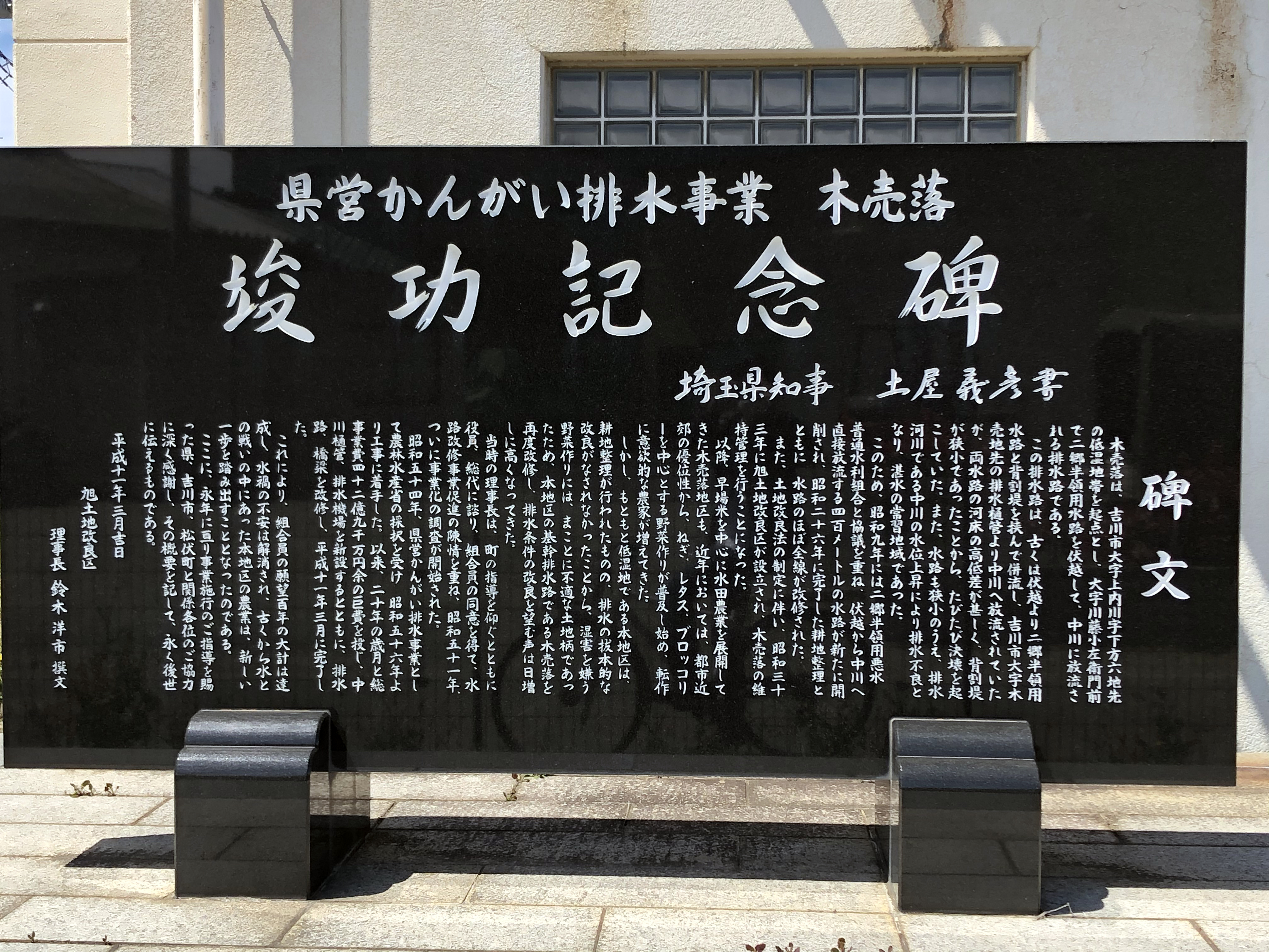 木売落排水機場碑文